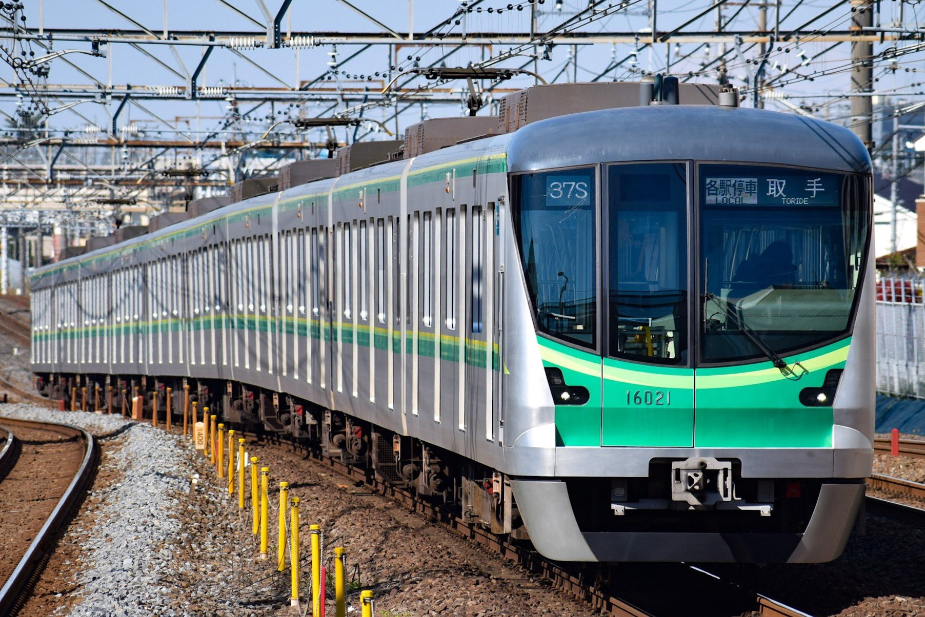 常磐緩行線に乗り入れる千代田線用の16000系